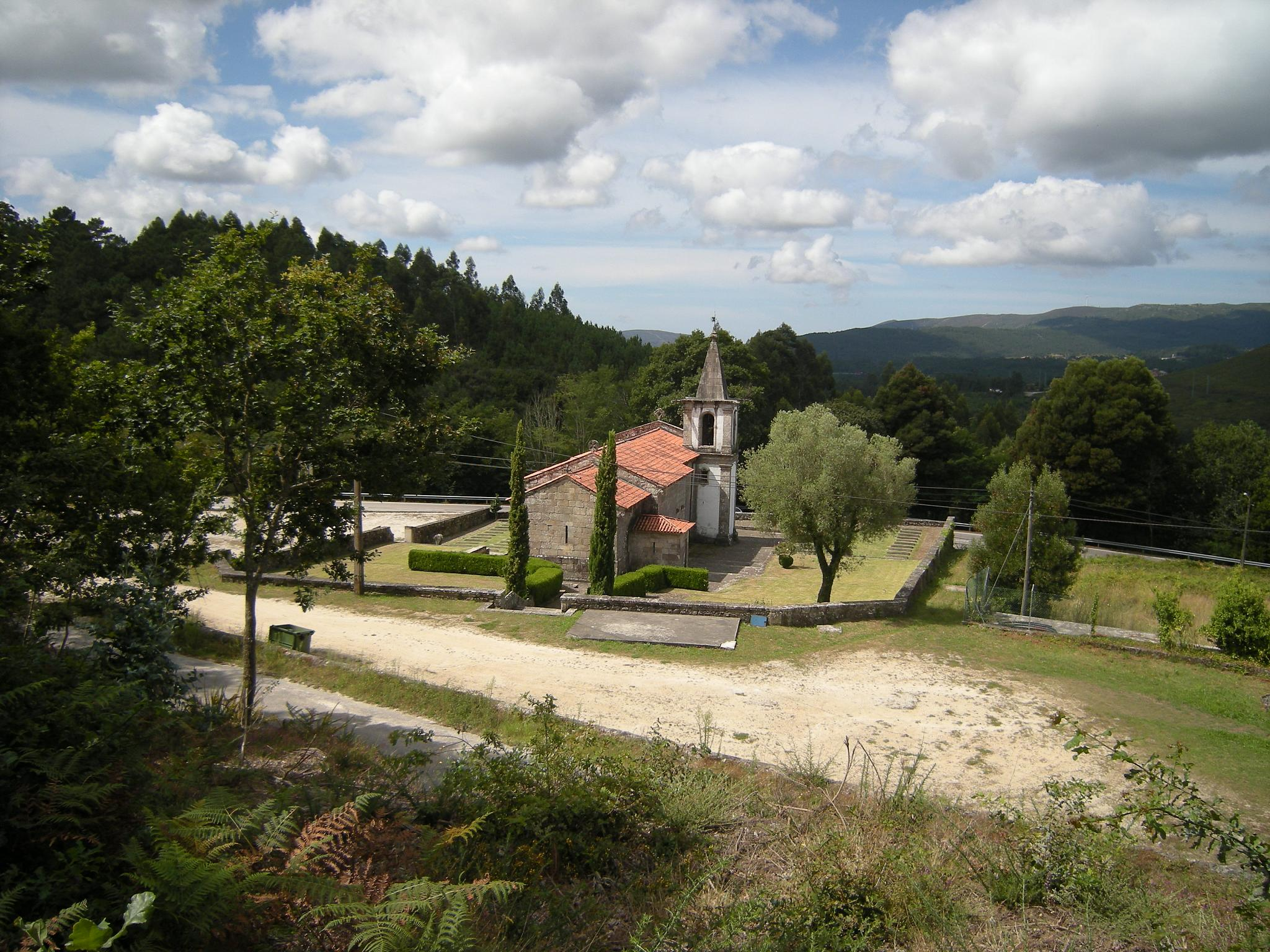 Igreja de São Pedro de Rubiães.